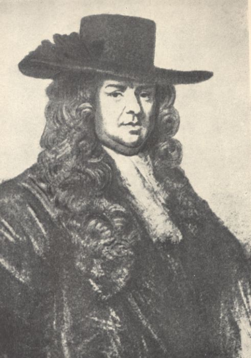 Pepys